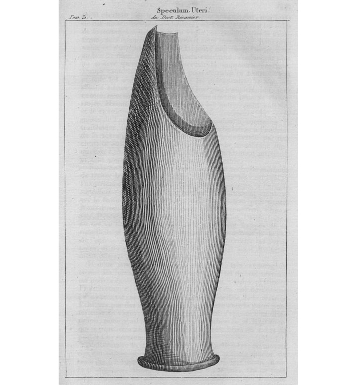 Abbildung eines Vaginal-Speculums nach Recamier